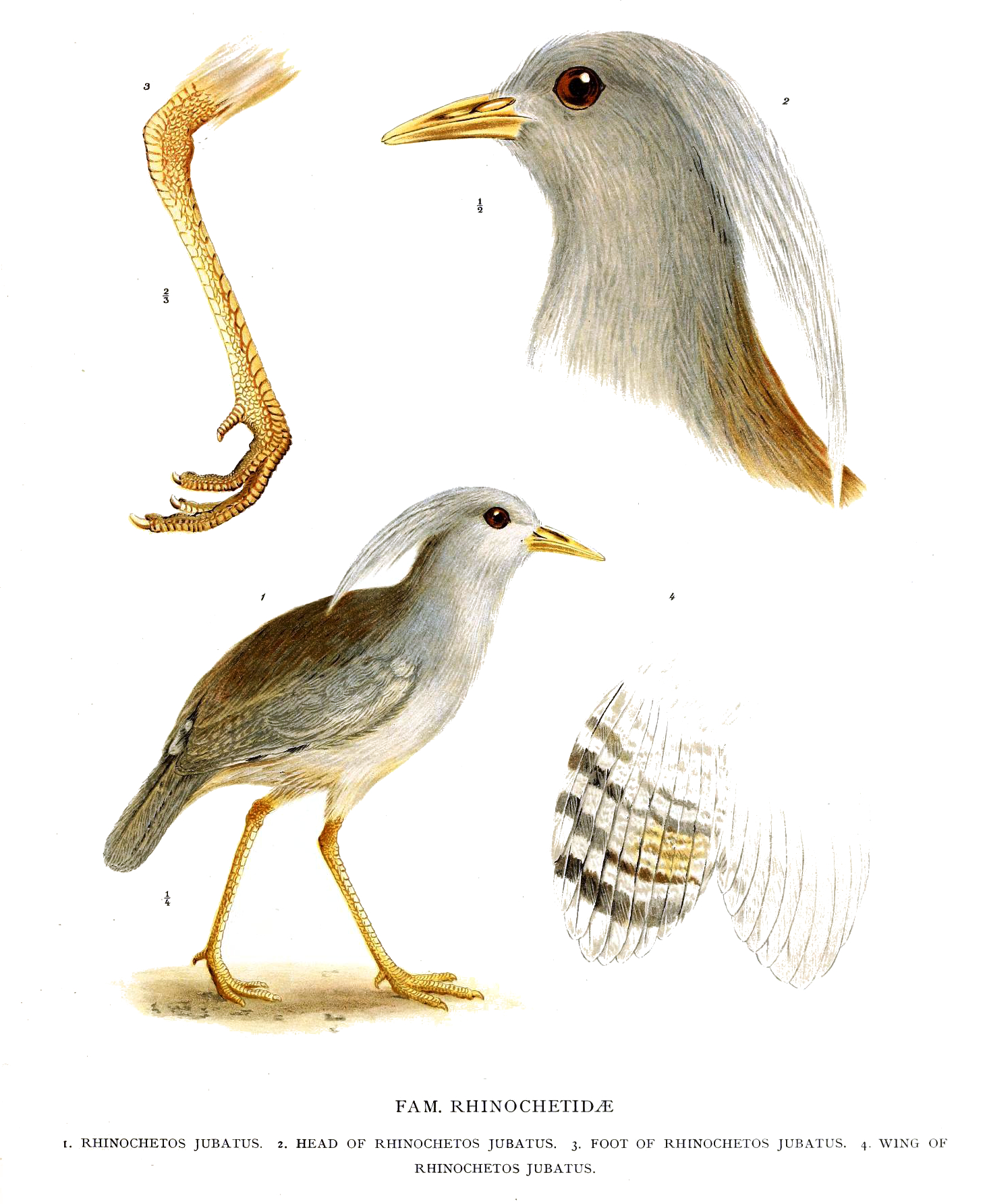 Rhynochetos jubatus